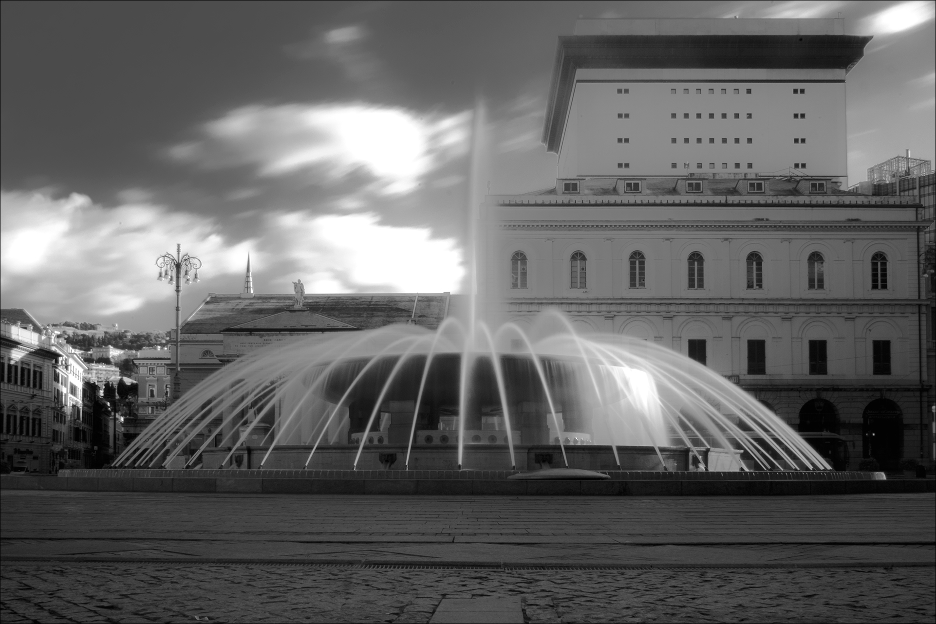 Fontana di Piazza De Ferrari This is a photo of a monument which is part of cultural heritage of Italy.